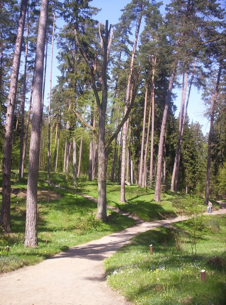 Arboretum w Kudypach. Fragment lasu. 05 maja 2007.